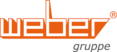 Logo Weber Gruppe